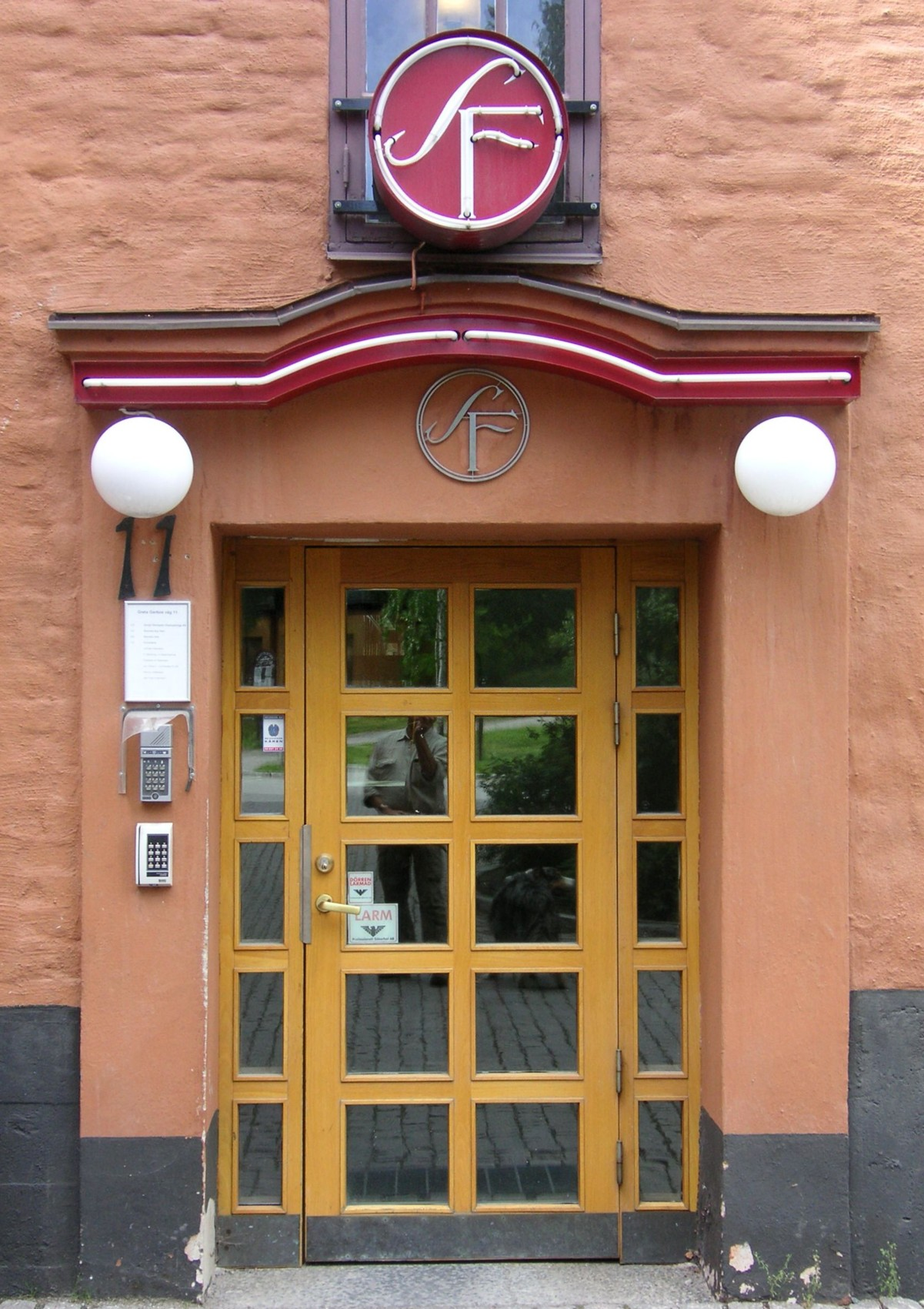 Entré till SF:s kontor på Filmstaden i Solna